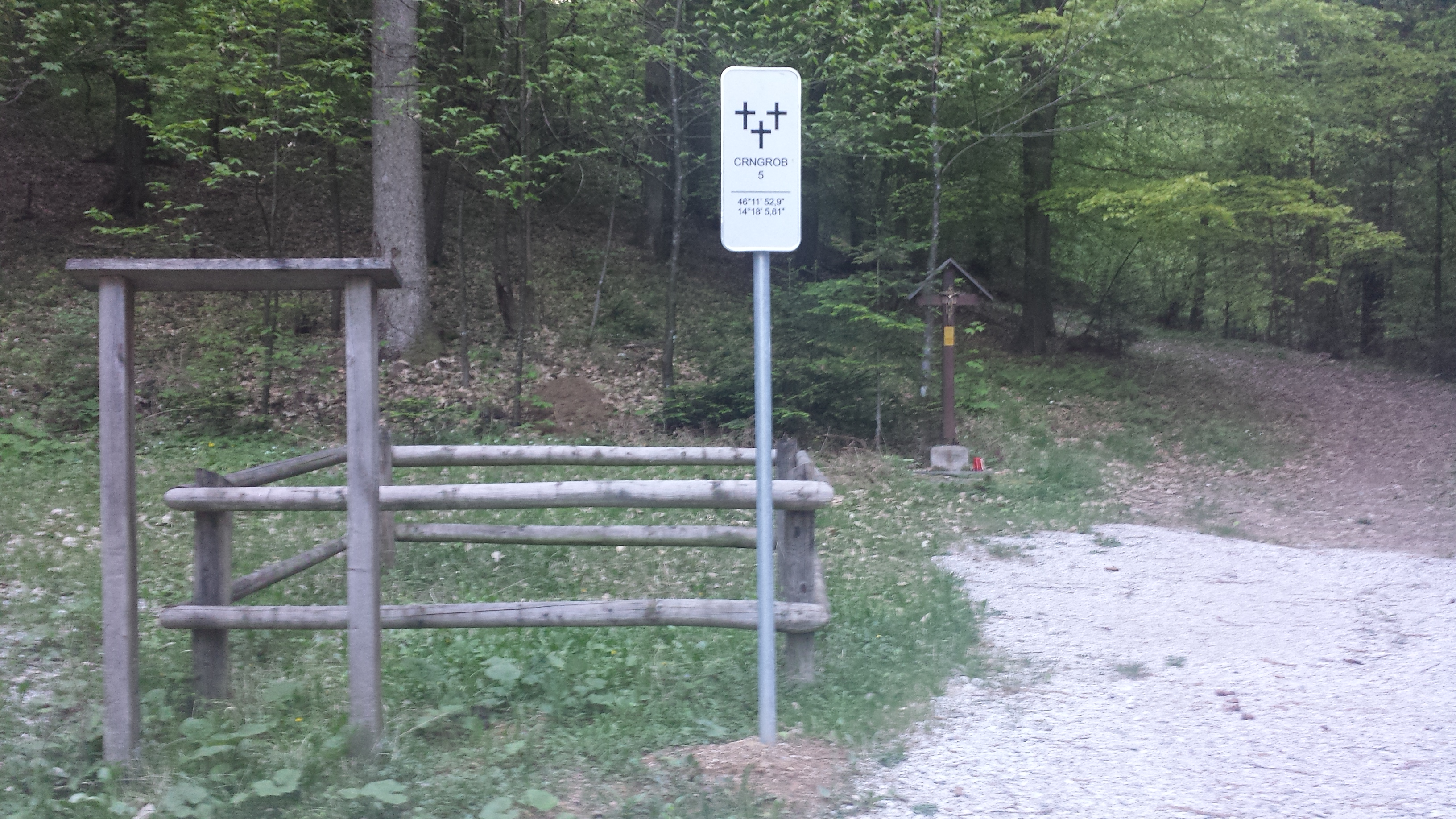 Povojni izvensodni poboji v Sloveniji, Škofja Loka, Crngrob 5